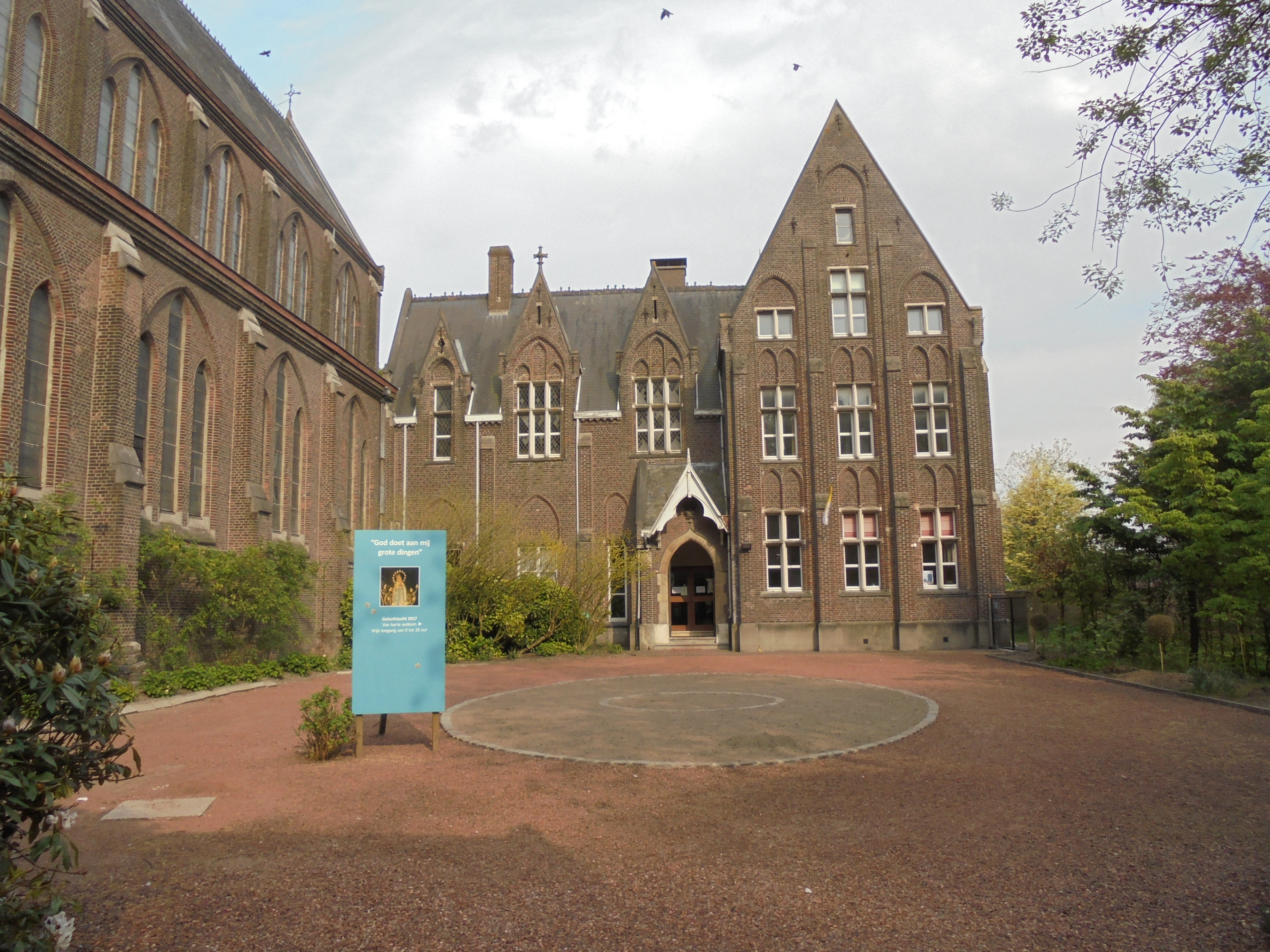 Residentie Sint-Victor, klooster der Jezuïeten - Onze Lieve Vrouwdreef - Lourdes - Oostakker - Gent - Oost-Vlaanderen - België